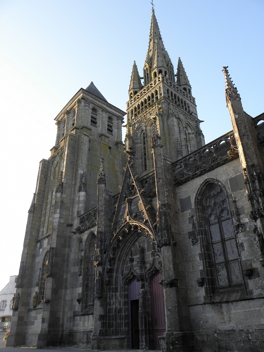 Façade méridionale de la basilique notre-Dame du Folgoët (29). .